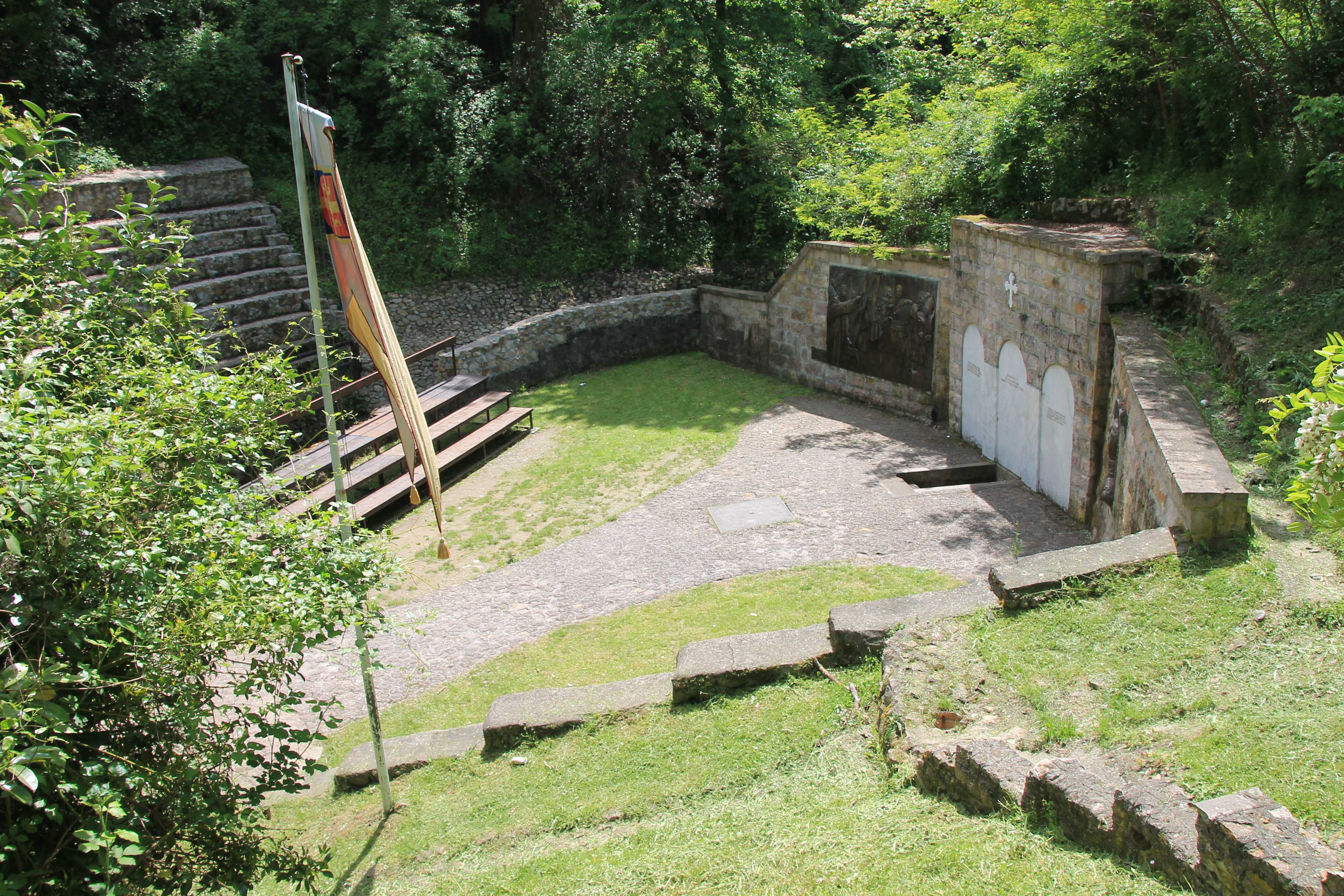 Znamenito mesto Orašac